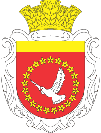 Герб Новомиргородського району Кіровоградської області